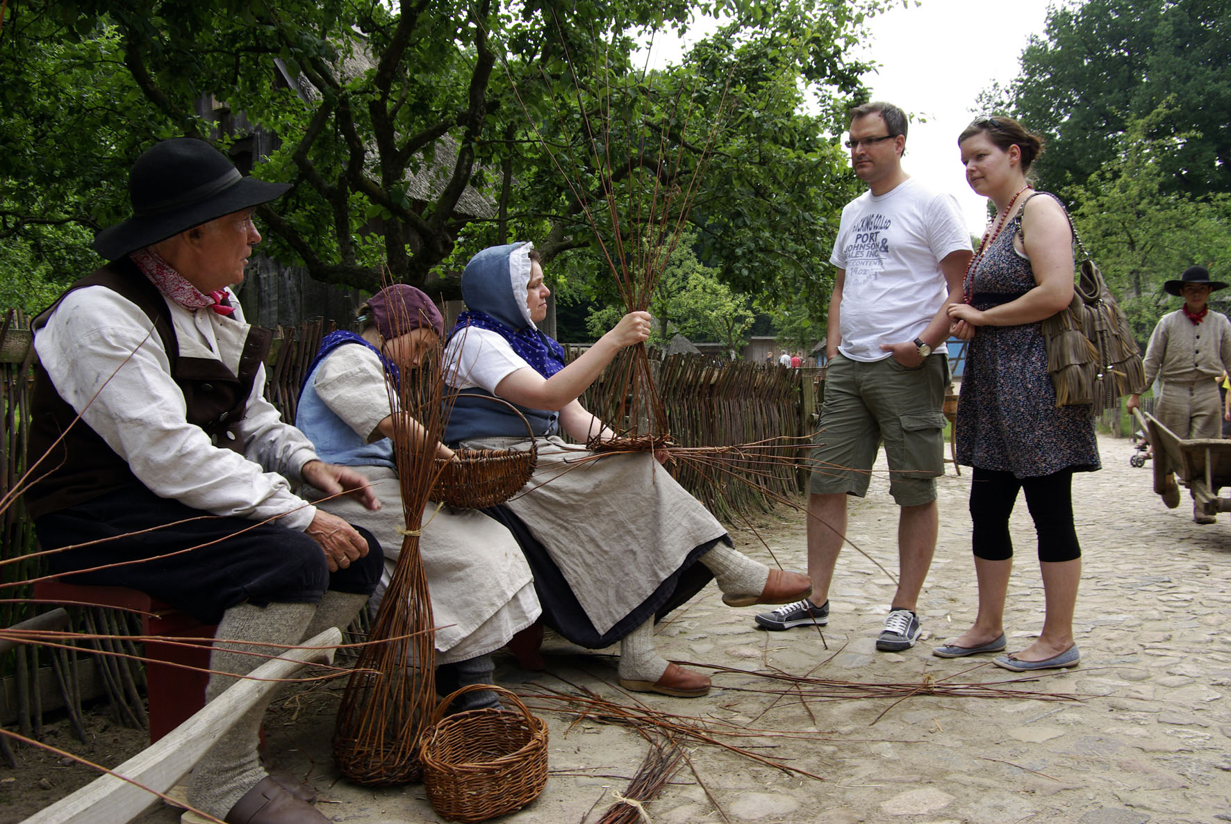 Living History im Freilichtmuseum am Kiekeberg: Gelebte Geschichte 1804